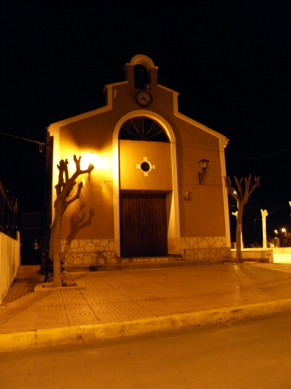 Ermita